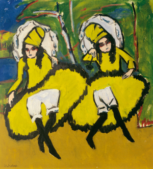 Ernst Ludwig Kirchner: Zwei Tänzerinnen, 1910/11, Franz Marc Museum, Kochel am See, Leihgabe aus Privatbesitz